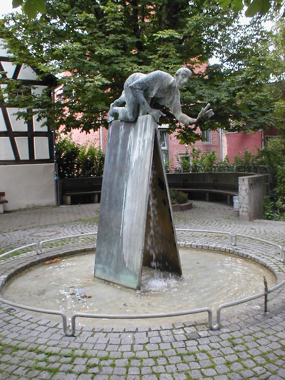 Dachreiterbrunnen in der Ortsmitte von Heilbronn-Horkheim. Entworfen 1989 von Karl-Ulrich Nuss